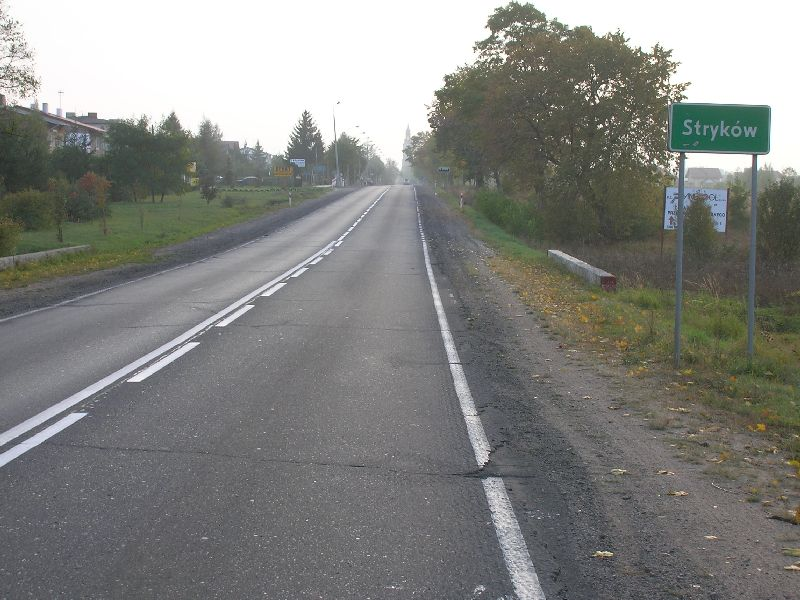 Stryków - wjazd od strony Głowna.